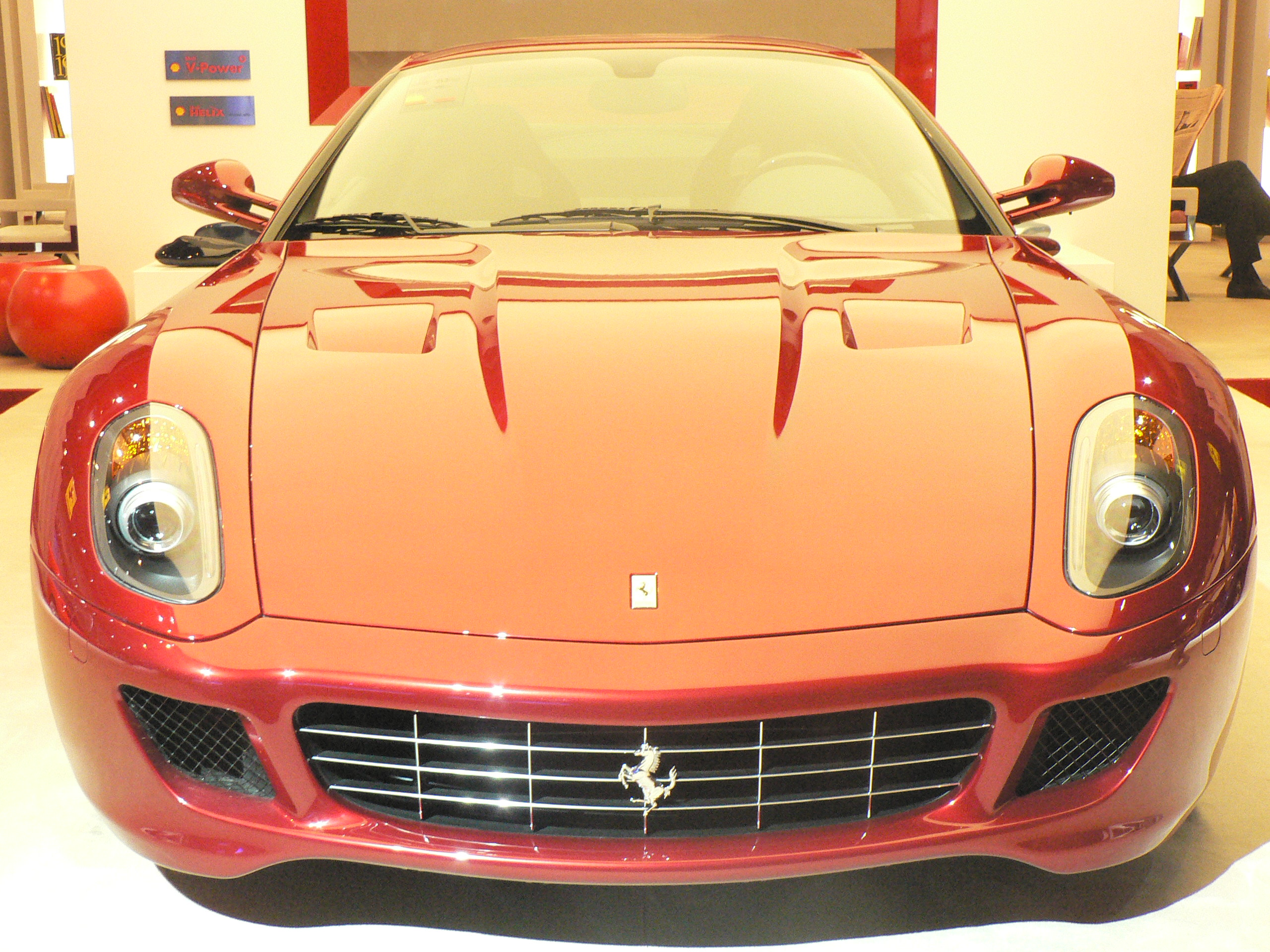 Mondial de l automobile de Paris (October 2006)